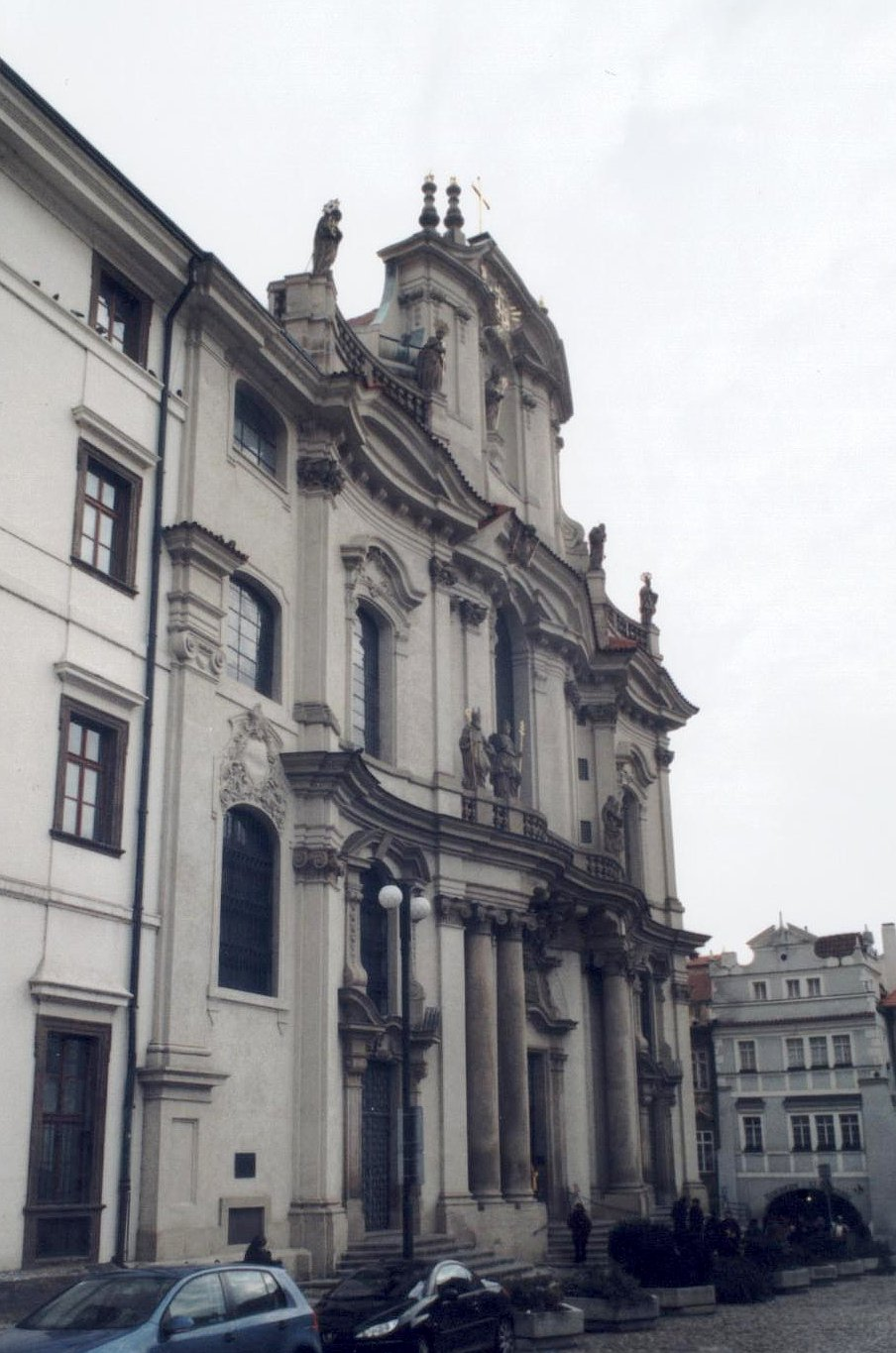 Kryštof Dientzehofer, průčelí kostela sv. Mikuláše v Praze na Malé Straně